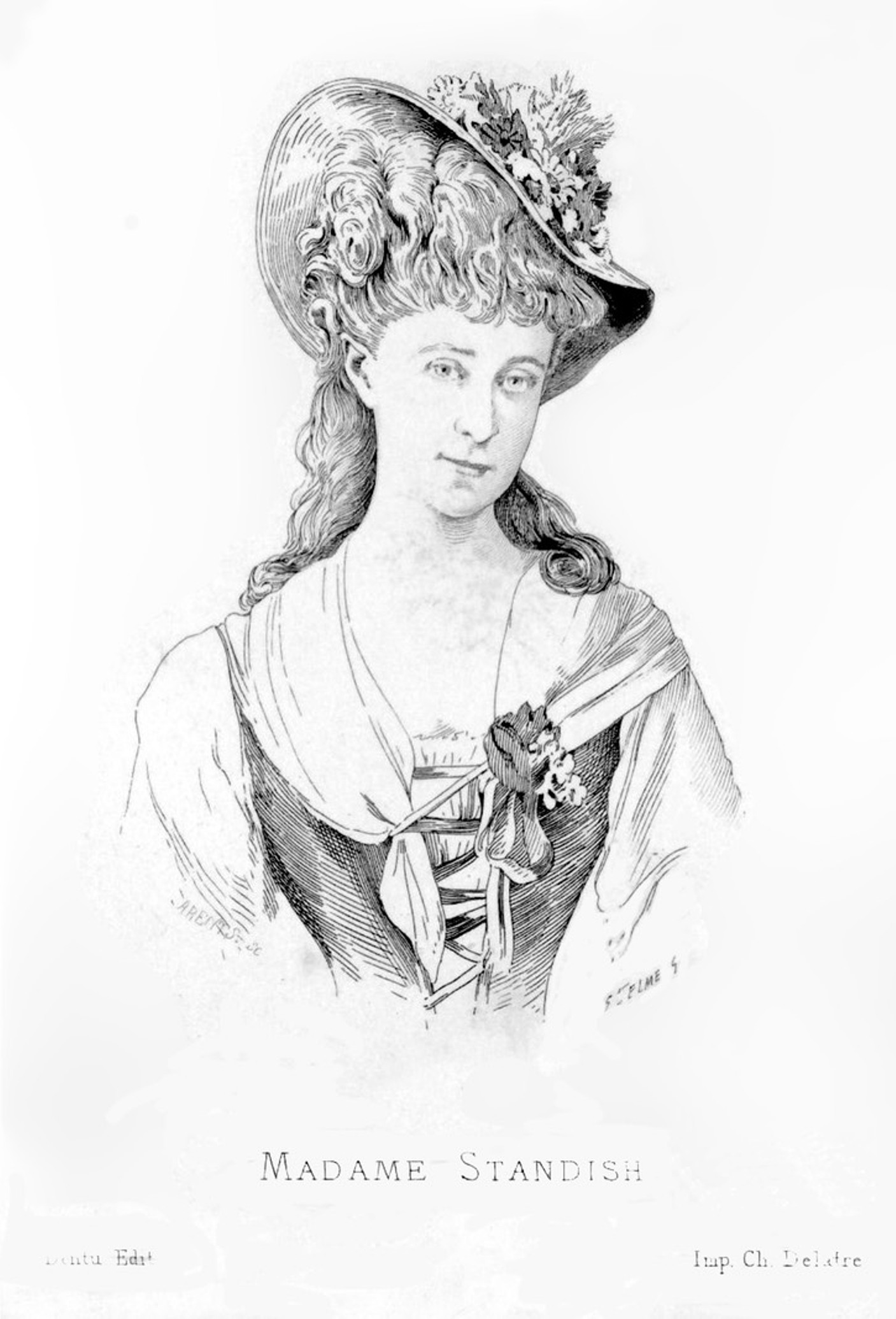 Gravure d'Hélène Standish, née Hélène de Pérusse des Cars (1847-1933) par Saint-Elme Gautier et publiée par l'éditeur Édouard Dentu.